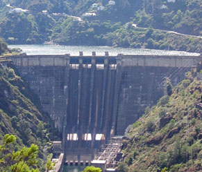 Alto y presa hidroeléctrica de Grandas de Salime. Autor: Wricardoh. Imagen cedida al dominio público.